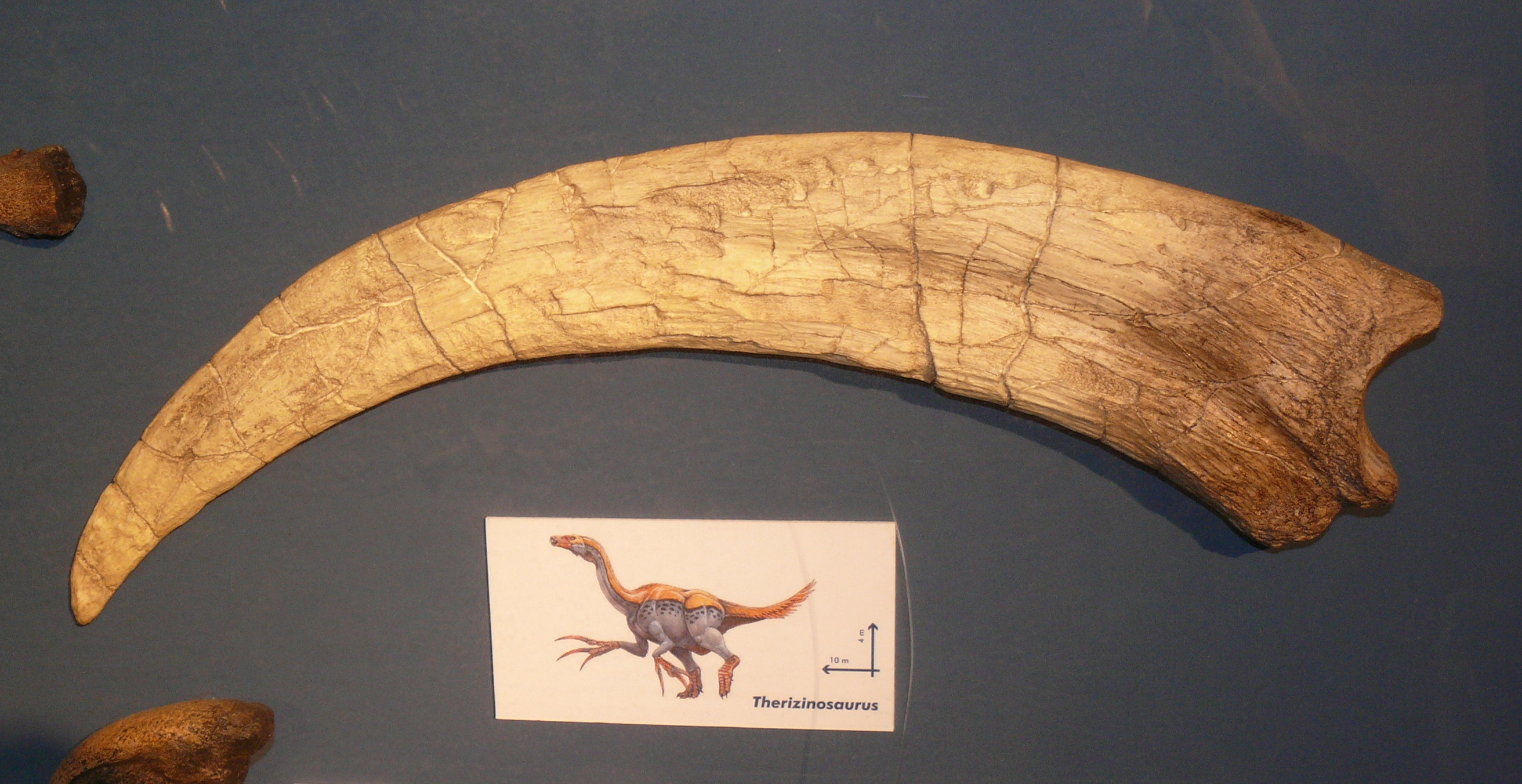 Therizinosaurus-Kralle